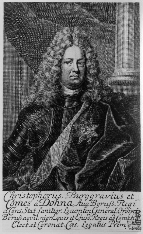 Christoph I. zu Dohna-Schlodien (1665-1733), brandenburgisch-preußischer General und Diplomat Kupferstich, Blatt 152x90mm, Bild 119x87mm Christophorus, Burggravius et Comes â Dohna, Aug[ustissimo] Boruss[iae] Regi â Cons[iliis] Stat[us] sanctior[ibus] Locumten[ens] General[is] Ordinis Boruss[ici] aquil[ae] nigr[ae] Eques et Ejusd[em] Regis ad Comitia Elect[ionis] et Coronat[ionis] Caes[areae] Legatus Prim[arius]